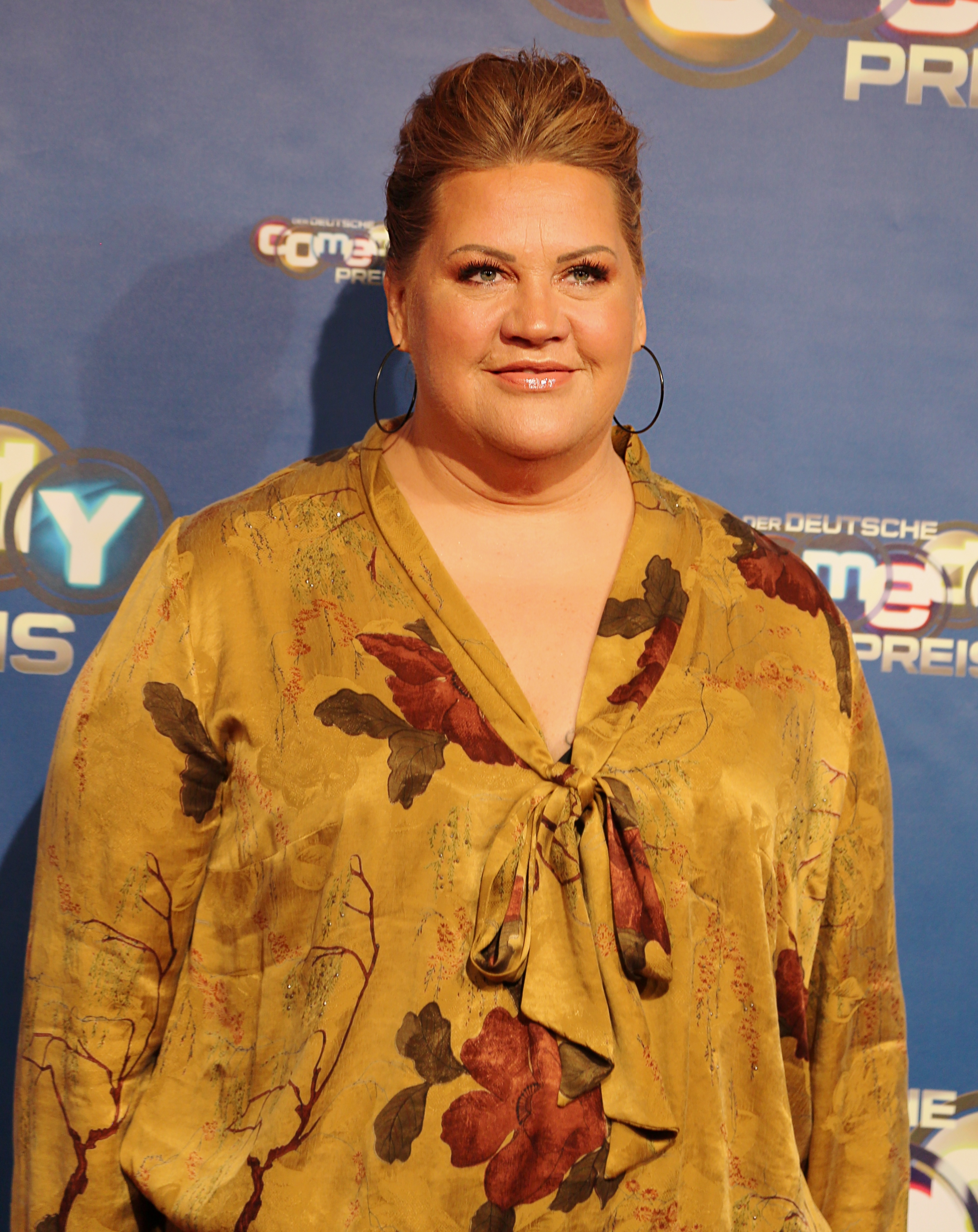 Ilka Bessin beim Deutschen Comedypreis 2017.